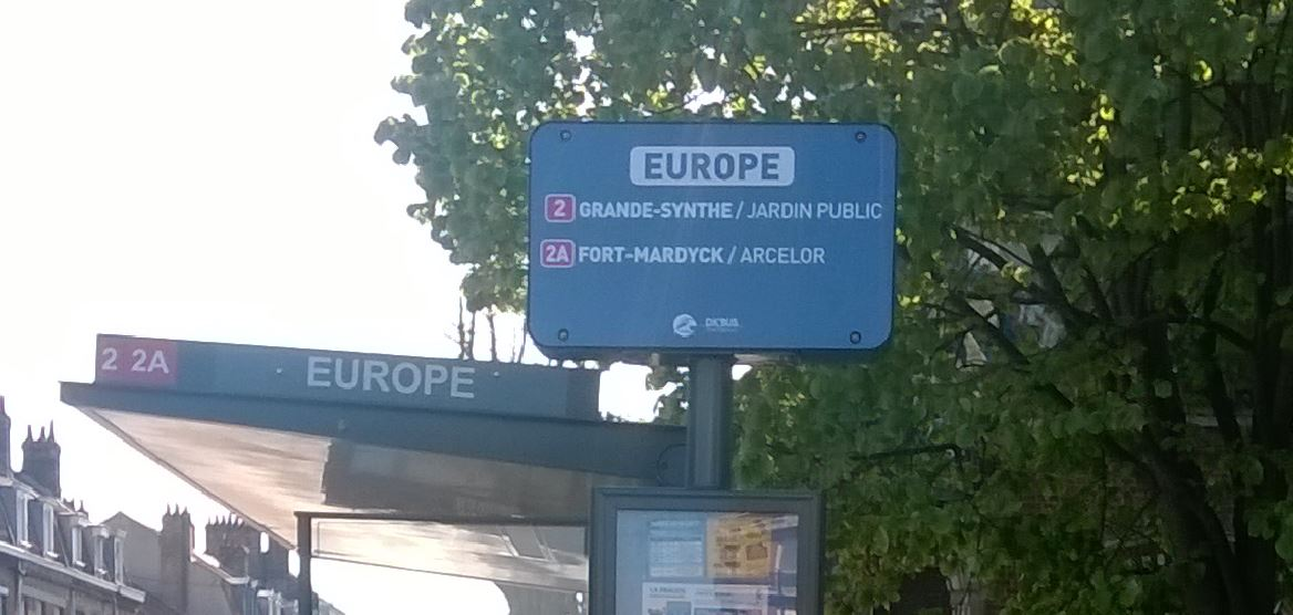 Europe2 DK